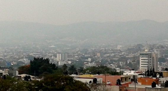 Tuxtla Gutiérrez - Panorámica 2